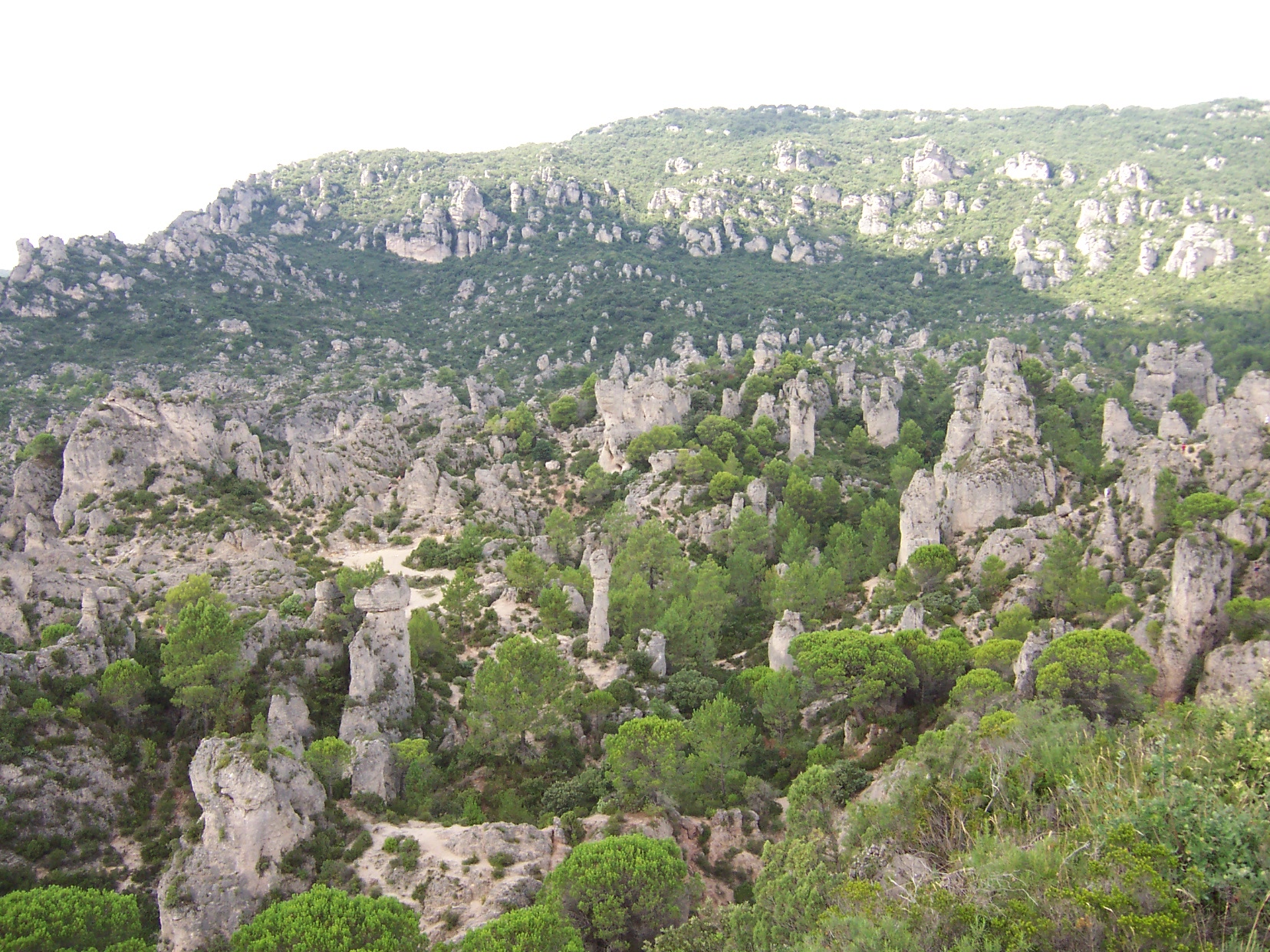 Vue sur un versant du cirque de Mourèze.